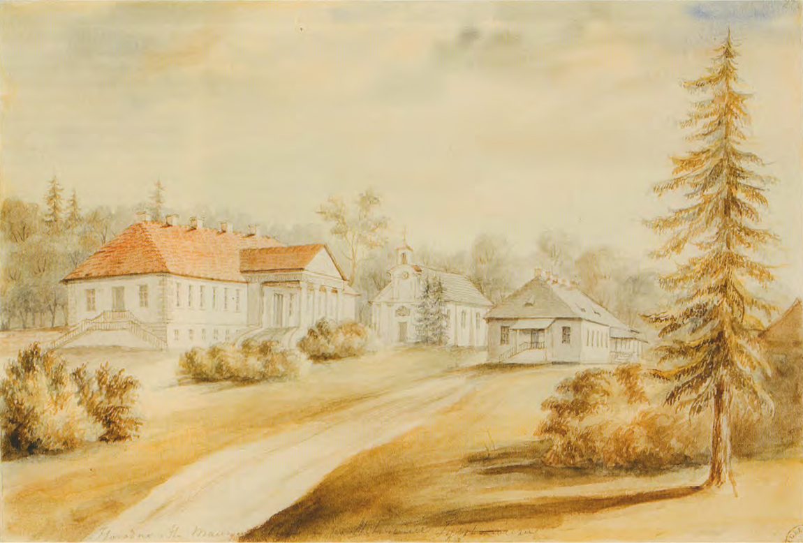 Беларуская (тарашкевіца): Гародна (Harodna), сядзіба Тышкевічаў (Tyškievič)